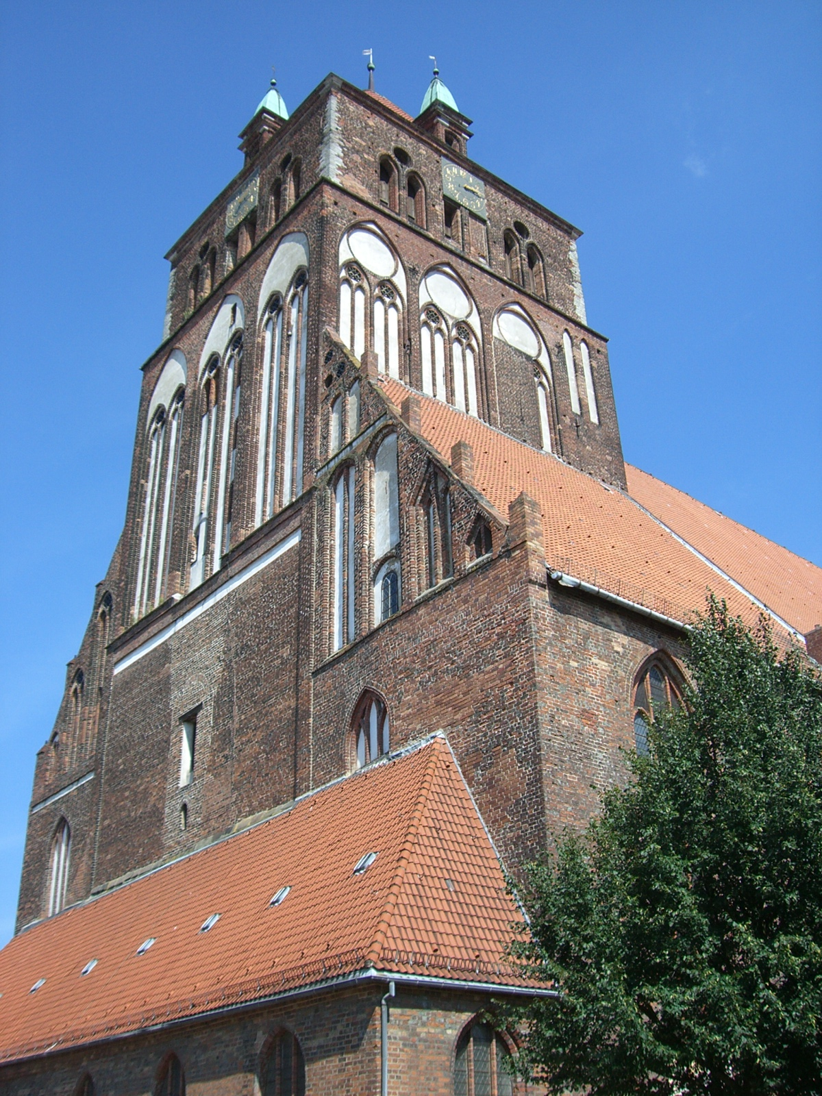 Marienkirche Greifswald